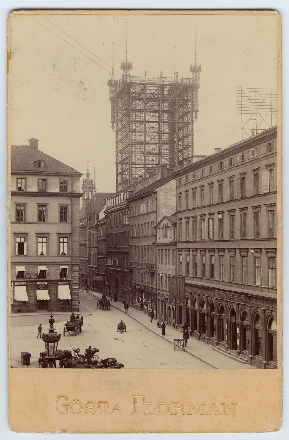 Depicted place: Stockholm, Brunkebergstorg (Sverige (SE))